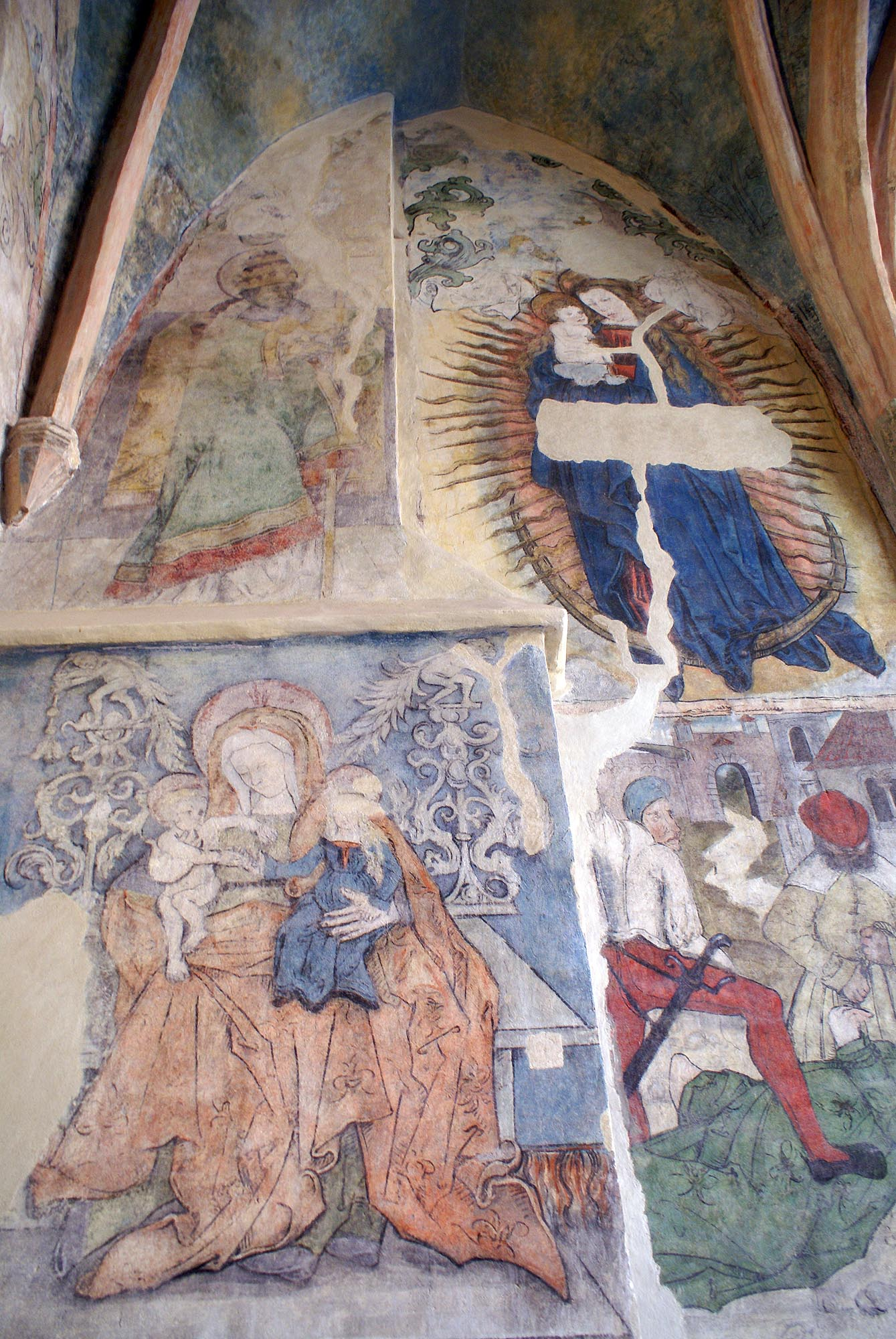 Wrocław, kościół par., ob. garnizonowy p.w. św. Elżbiety, 1 ćw. XIV, 1486